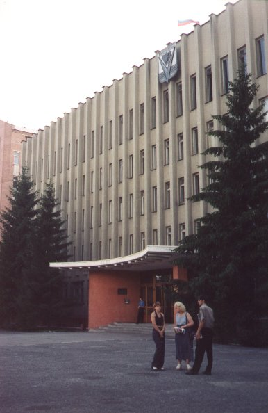 Stadt-Rathaus (2000) Aufgenommen auf einer Austauschfahrt einer Delmenhorster Schule in die Partnerstadt.